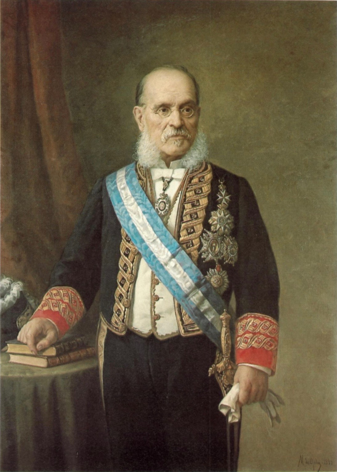 José García Barzanallana